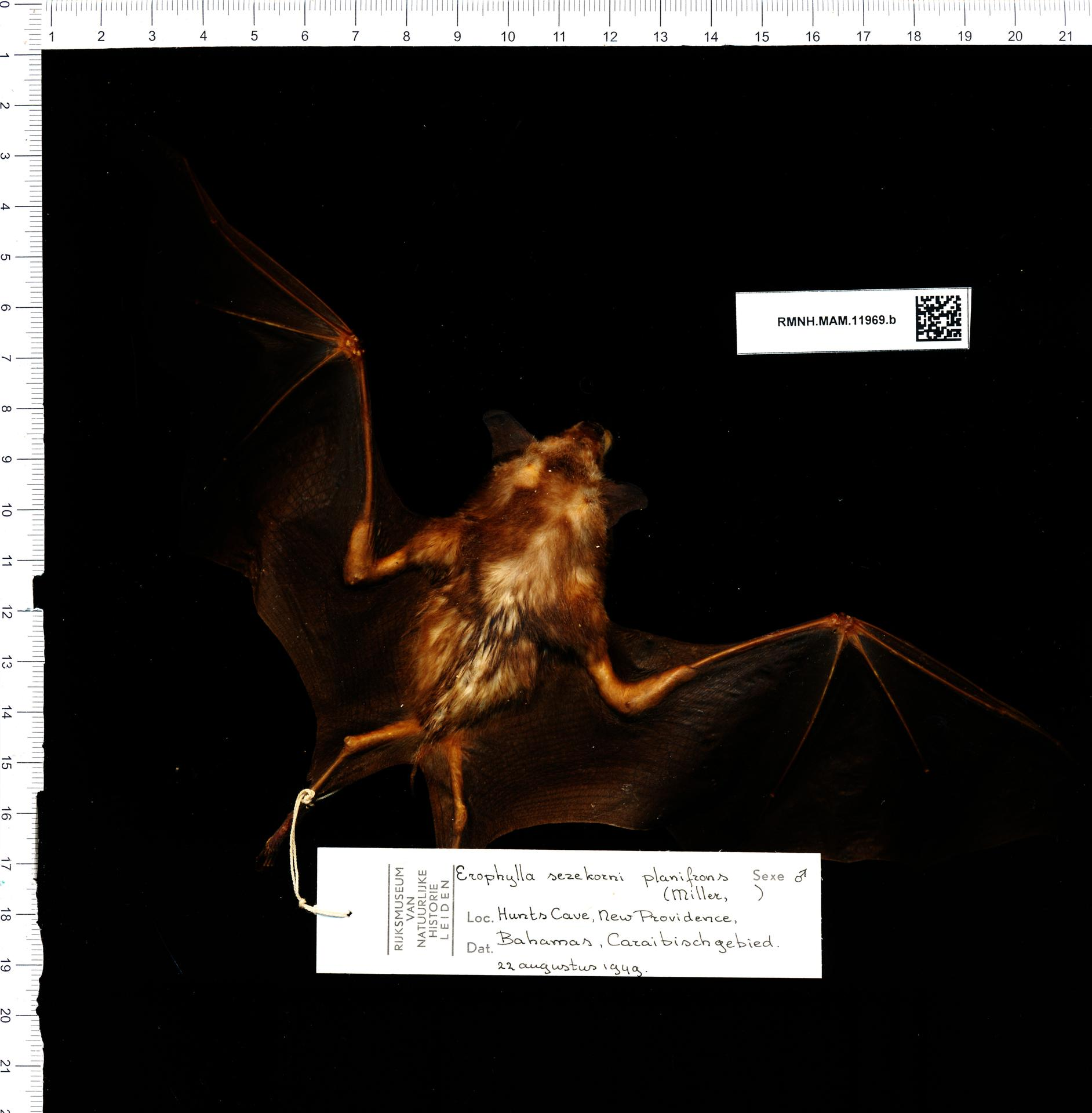 Erophylla sezekorni planifrons